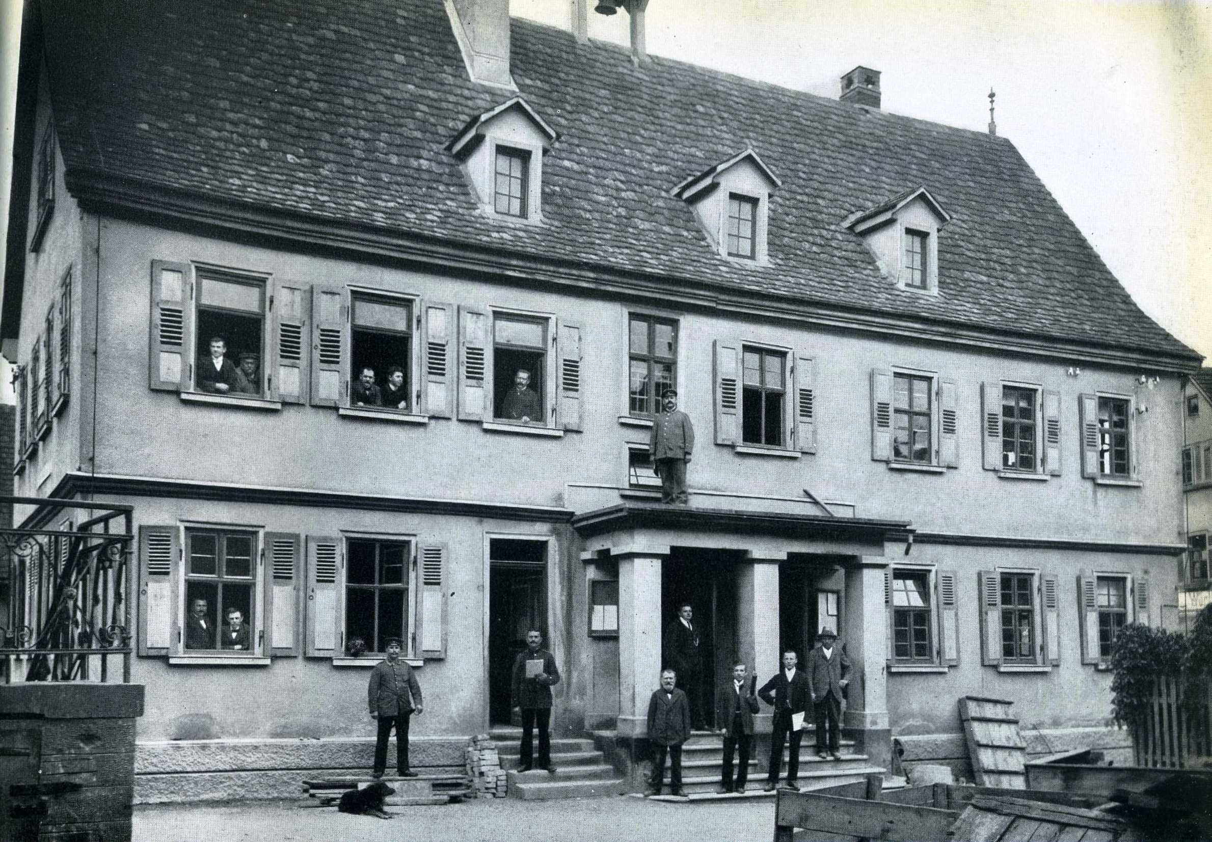 Rathaus in Böckingen, Aufnahme aus dem Jahr 1905